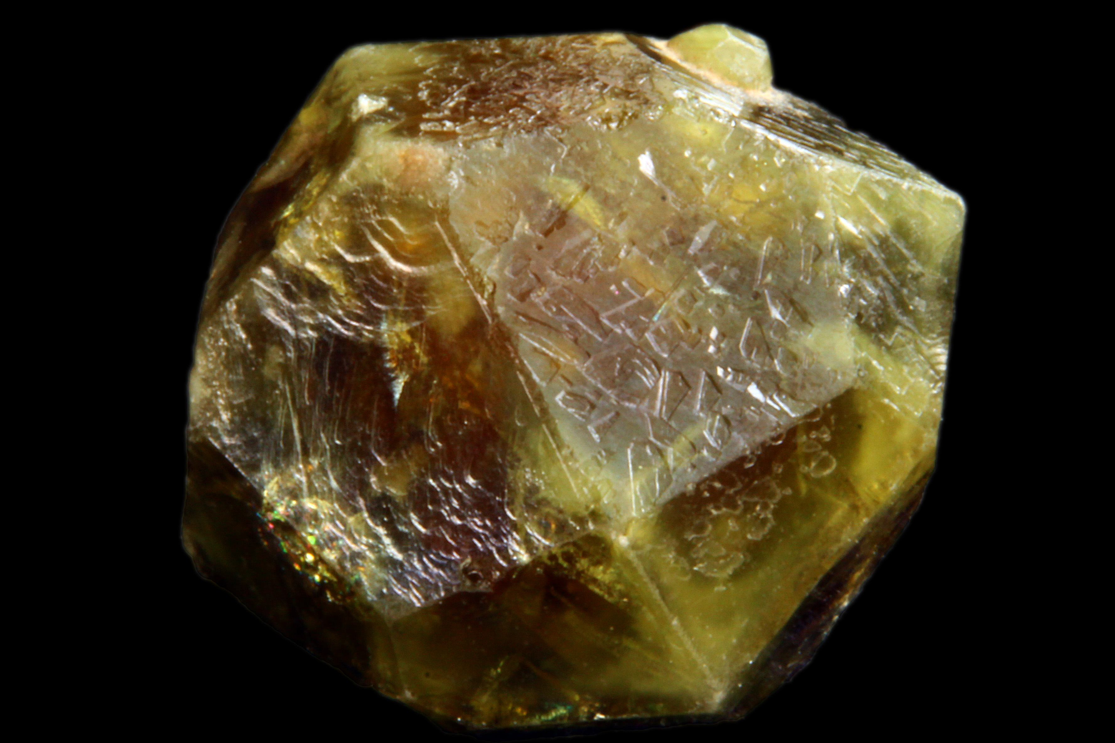 Granat, grossular - Chernyshewsk, Jakucja, Rosja.